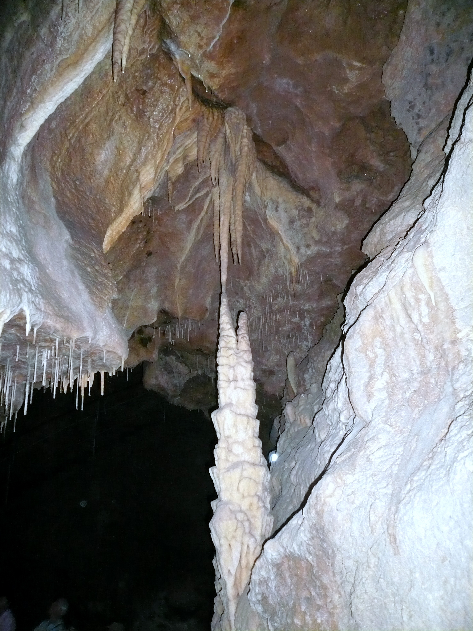 Teufelshöhle bei Pottenstein, Tropfsteingruppe im Barbarossadom